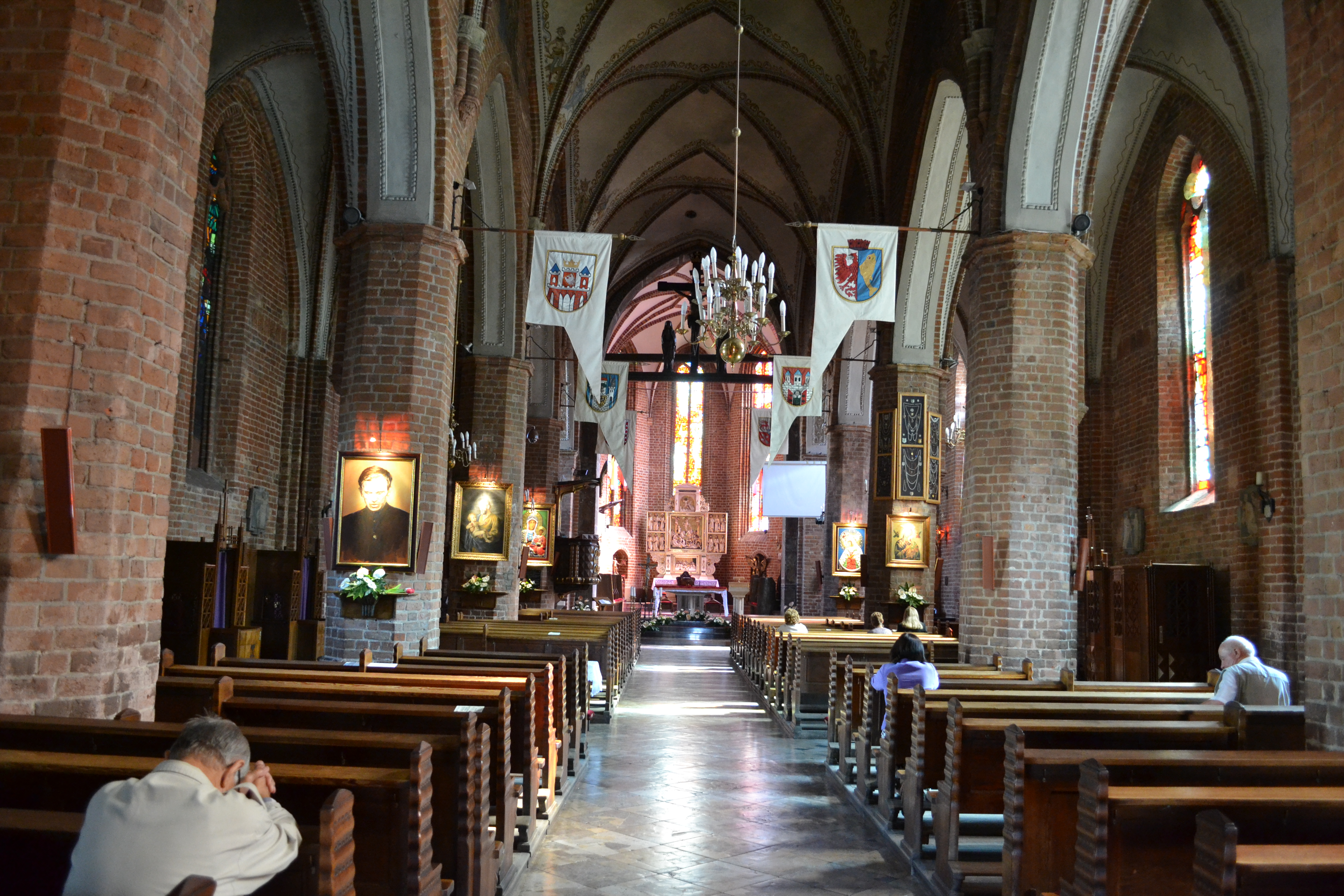 Katedra Wniebowzięcia NMP w Gorzowie Wielkopolskim